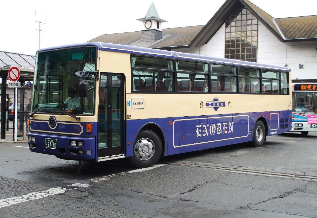 江ノ電バス藤沢821号車。この日は定期遊覧バス「よりとも号」に配される。